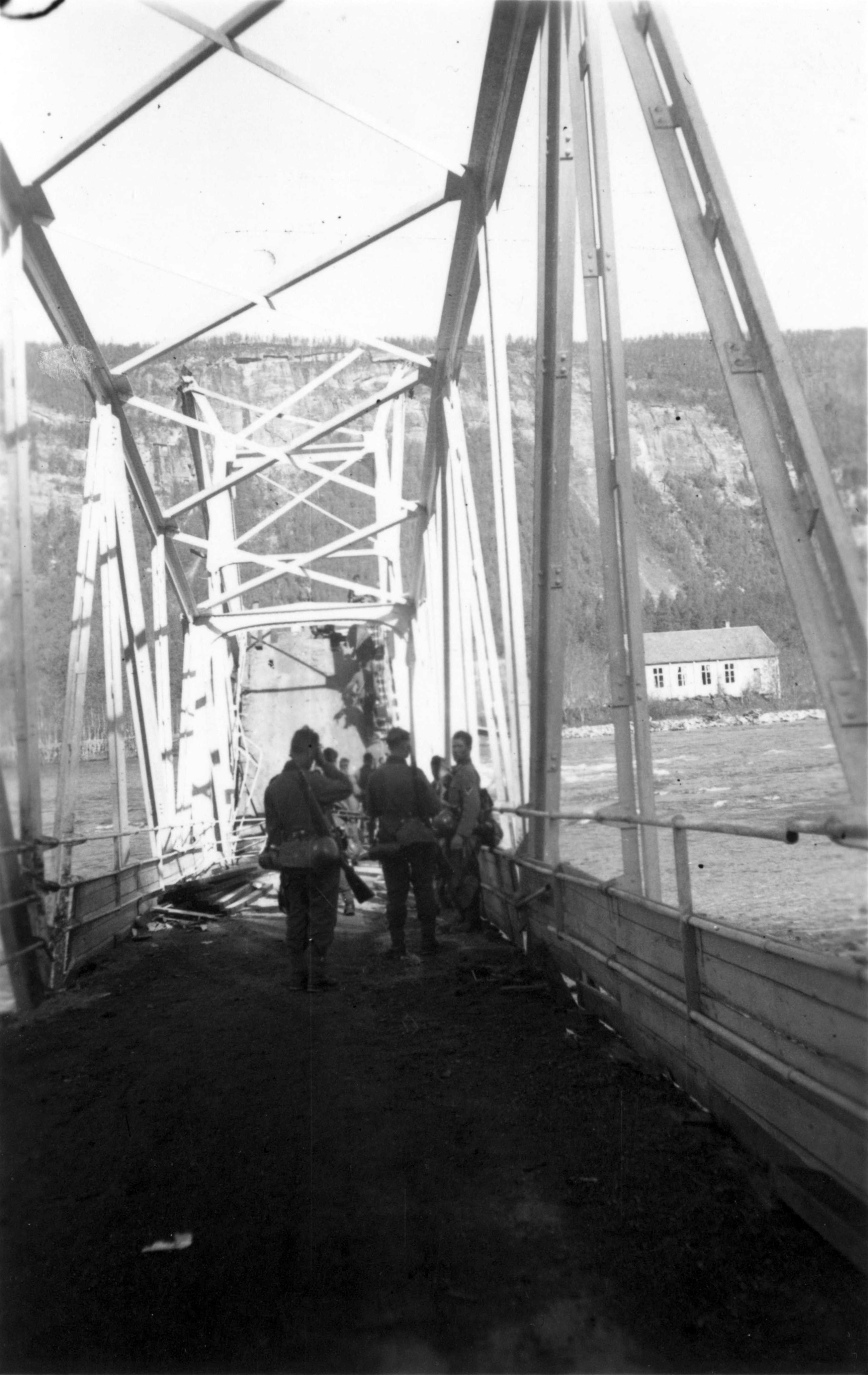 Pothusbrua i Saltdal Tittel / Title: Den sprengte brua, Pothus, Saltdal Dato / Date: 25. mai 1940 Fotograf / Photographer: Rudi Margreiter Sted / Place: Saltdal, Nordland, Norge Eier / Owner Institution: Arkiv i Nordland Lenke / Link: Arkiv i Nordland Arkivreferanse /Archive reference: AIN.NA143.0018 Fra Dag Skogheims Privatarkiv